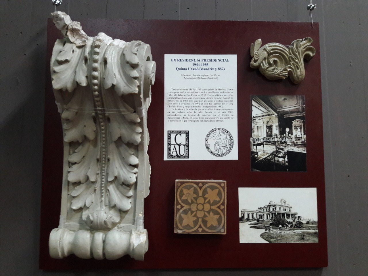 Fragmentos originales del Palacio Unzué que se encuentran en FADU